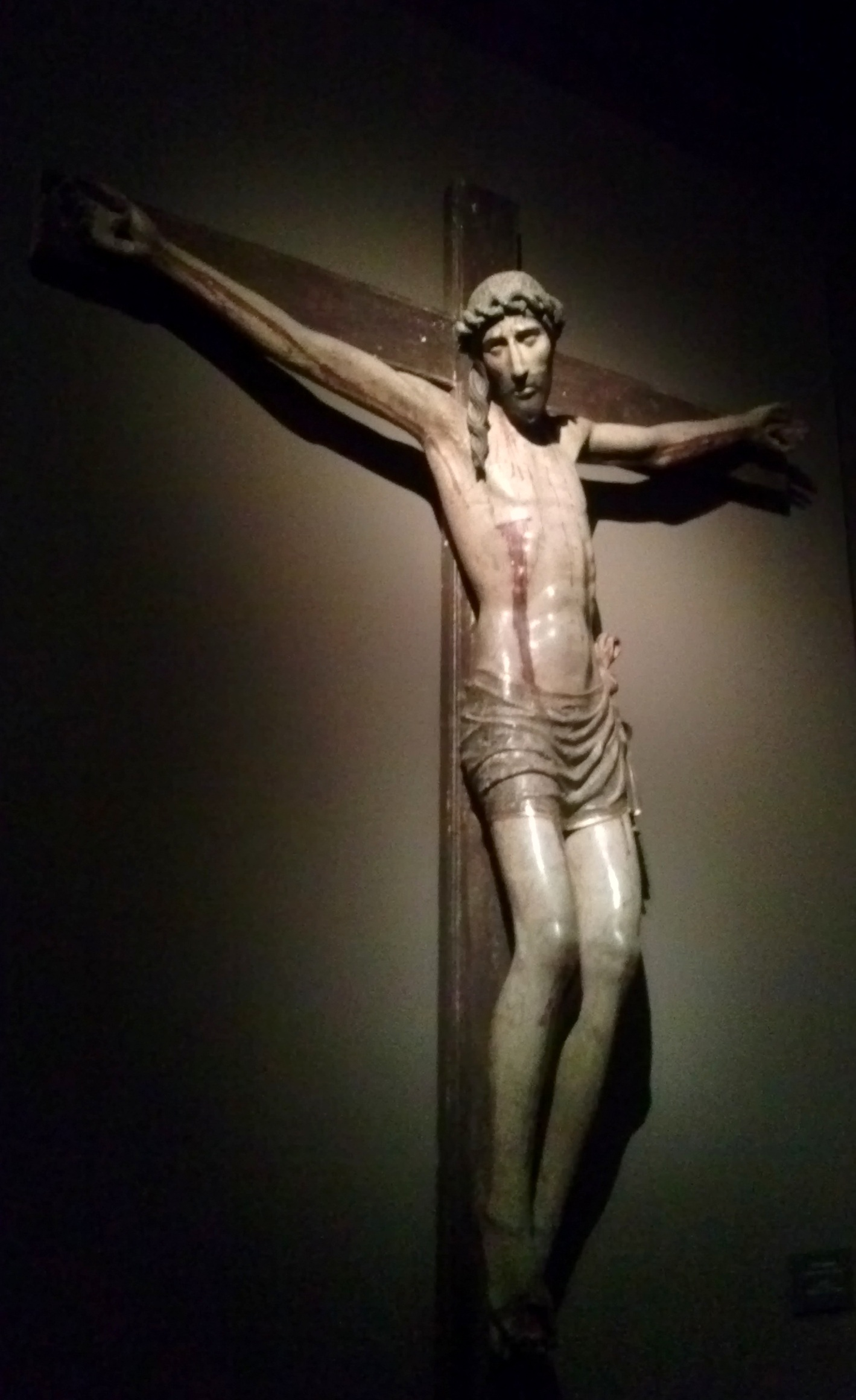 La exposición "A su imagen" termina el 12 de abril y había que verla. Me ha llamado mucho la atención este Cristo, y encuentro que la iluminación es muy adecuada, casi en penumbra. Las fotos son de móvil ... Colección particular Coll & Cortés, Madrid. Atribuido a Sebastián de Almonacid (1460-1526)